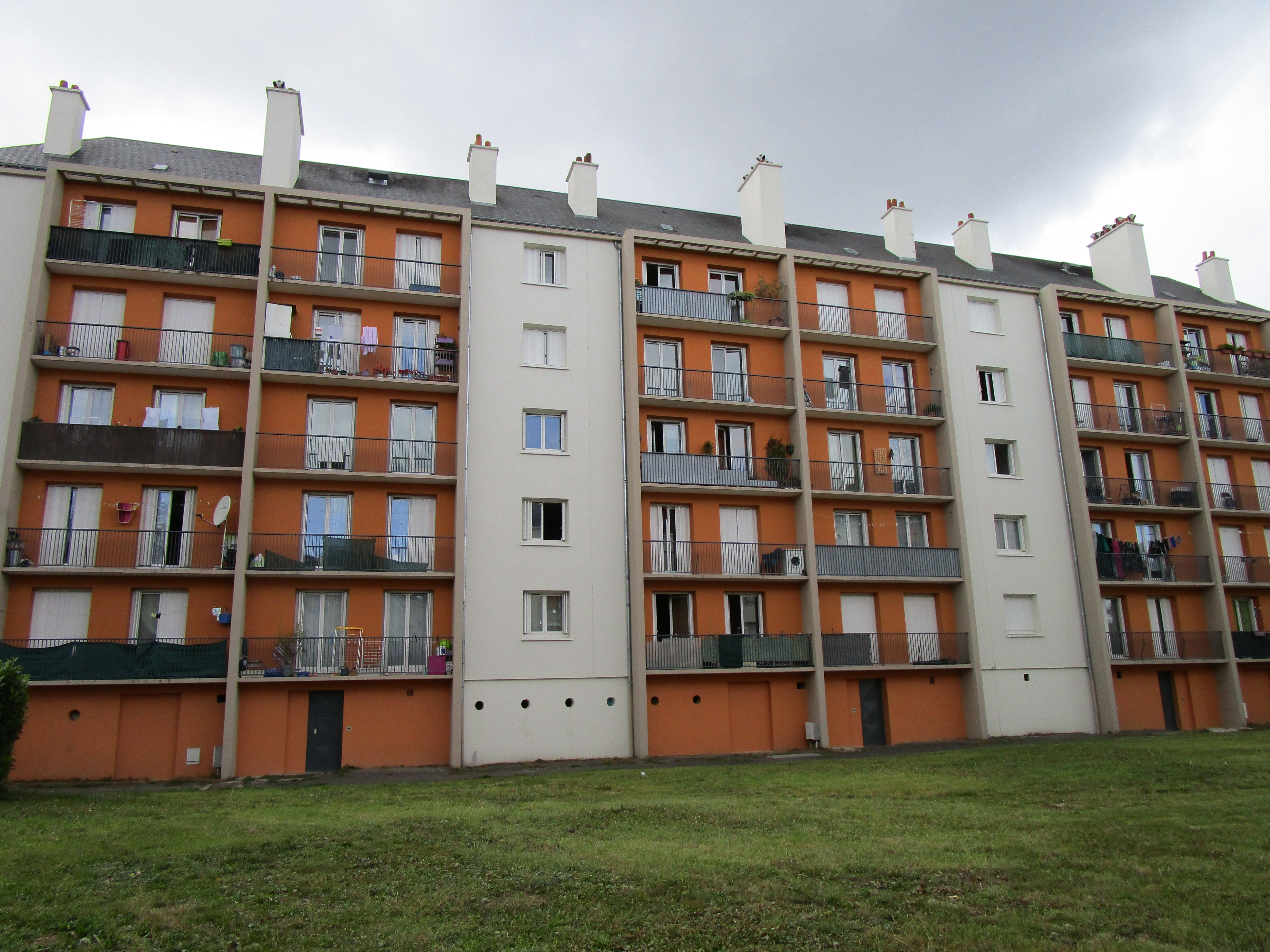 Immeuble de logement collectifs, rue Saint-Symphorien, à Tours